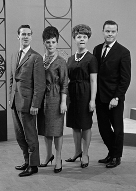 De Fouryo's in het Nederlandse televisieprogramma Rooster in 1963